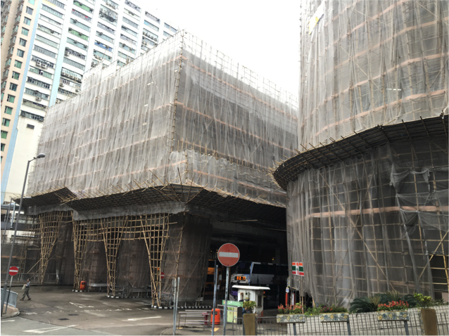 中文（香港）: 被圍封的田灣商場